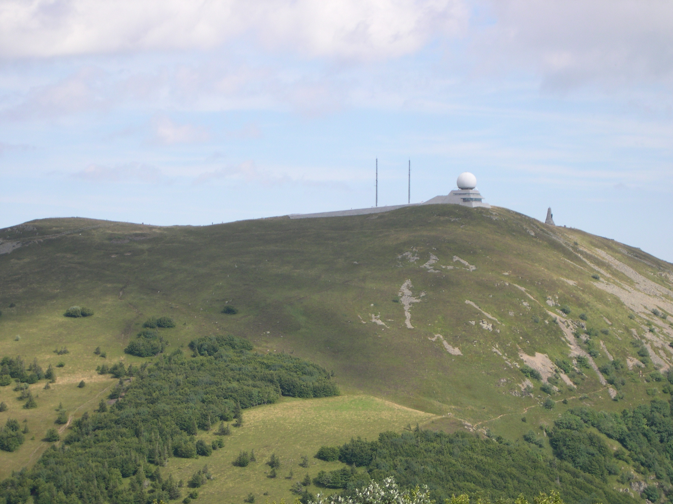 La partie sommitale du Grand Ballon 68 depuis le Storkenkopf.